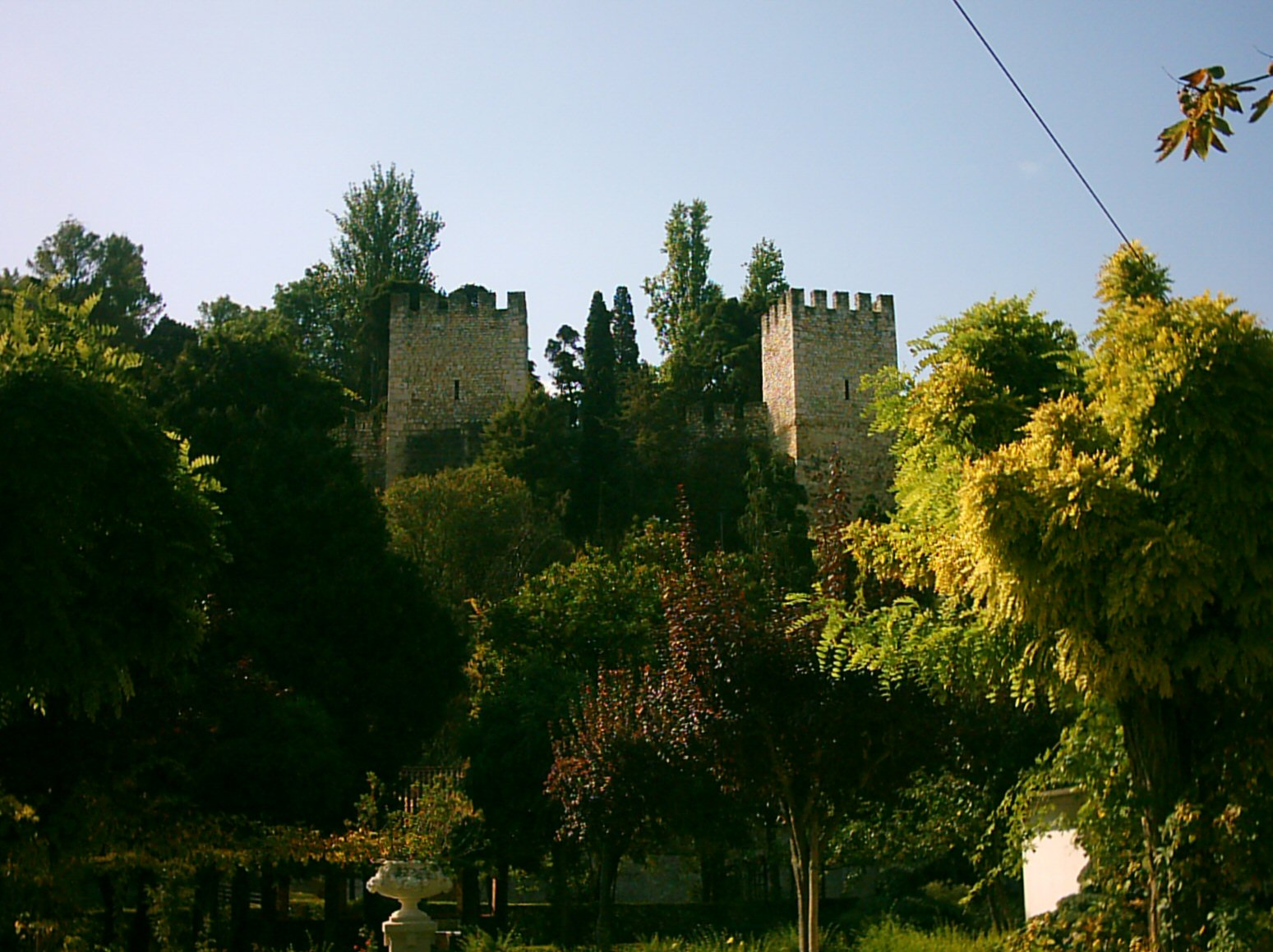 Castelo de Torres Novas